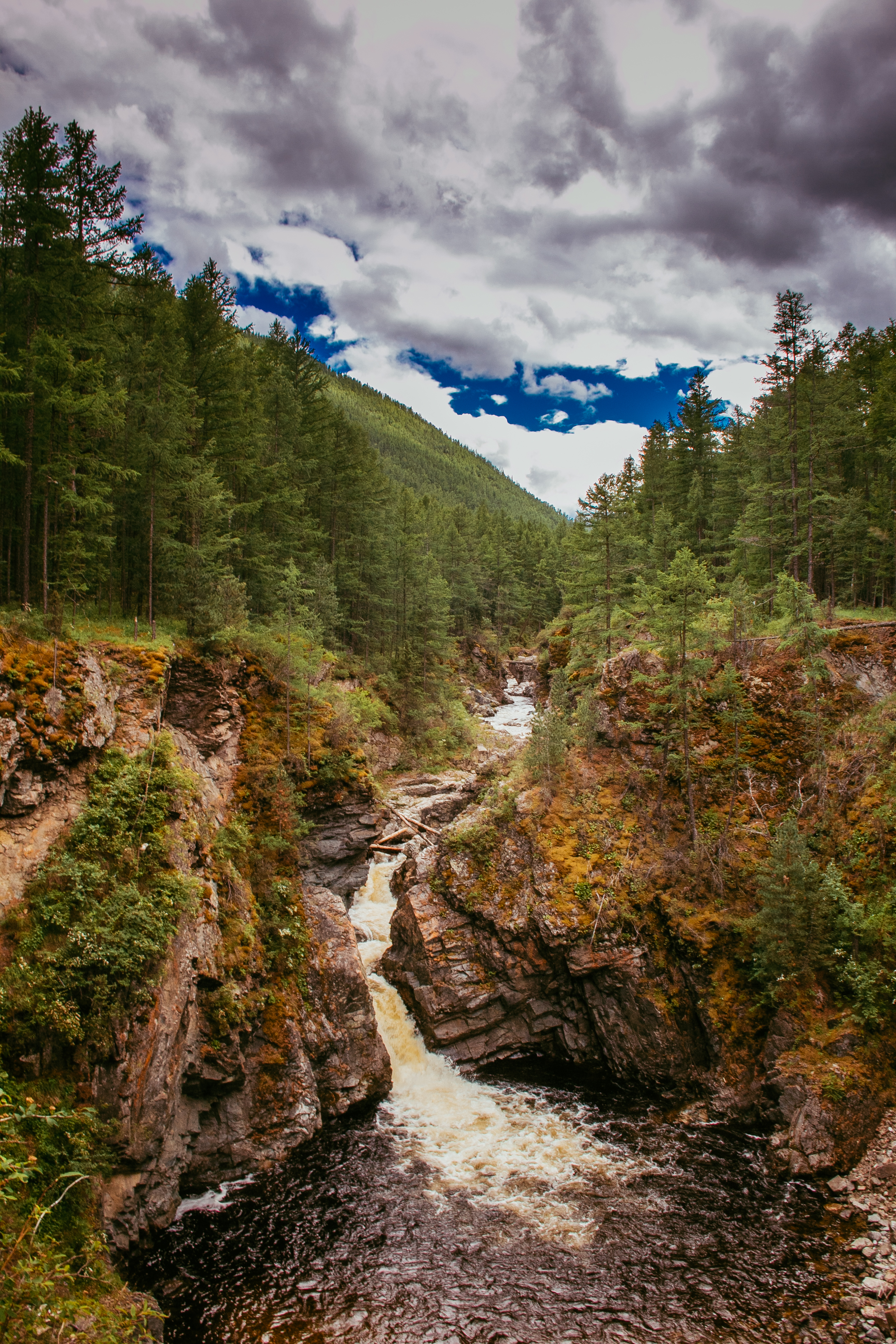 Природы Тувы